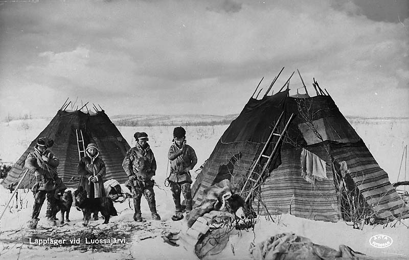 Sameläger vid Luossajärvi.; Byggnadsverk; Fjällmiljö; Miljöer; Nomadnäring; Sameviste